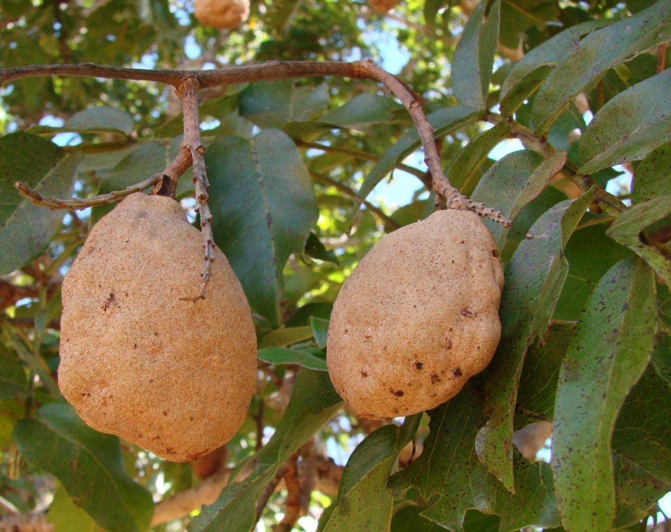 Dipteryx alata - FABACEAE Formosa - Goiás - Brasil.